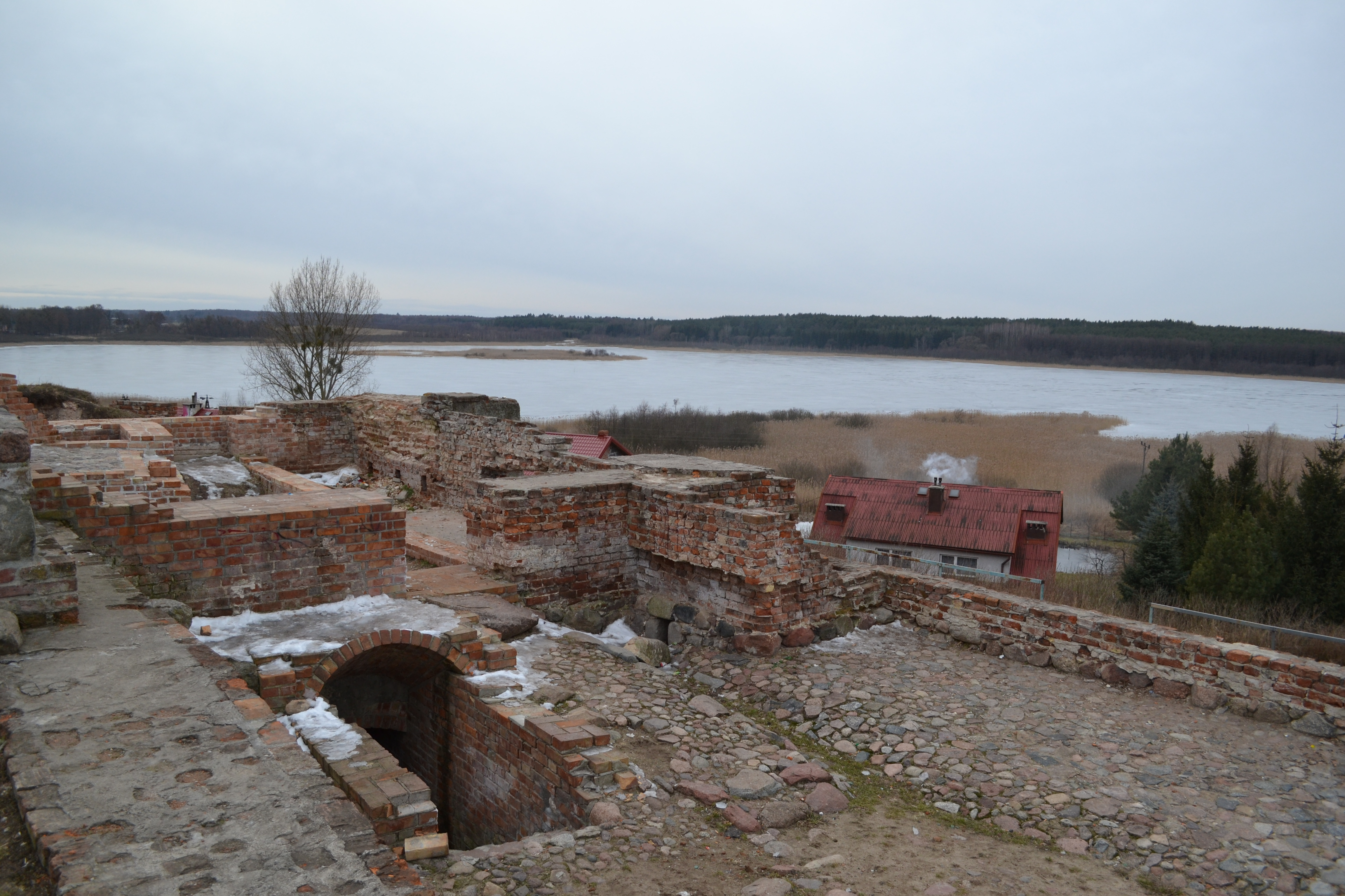 Prabuty, ul. Miła / ul. Mazurska - relikty zamku biskupów pomezańskich (zabytek nr 87)